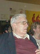 Walon: Jean-Marie Lecomte (2003) (poirtrait saetchî pa L. Mahin)